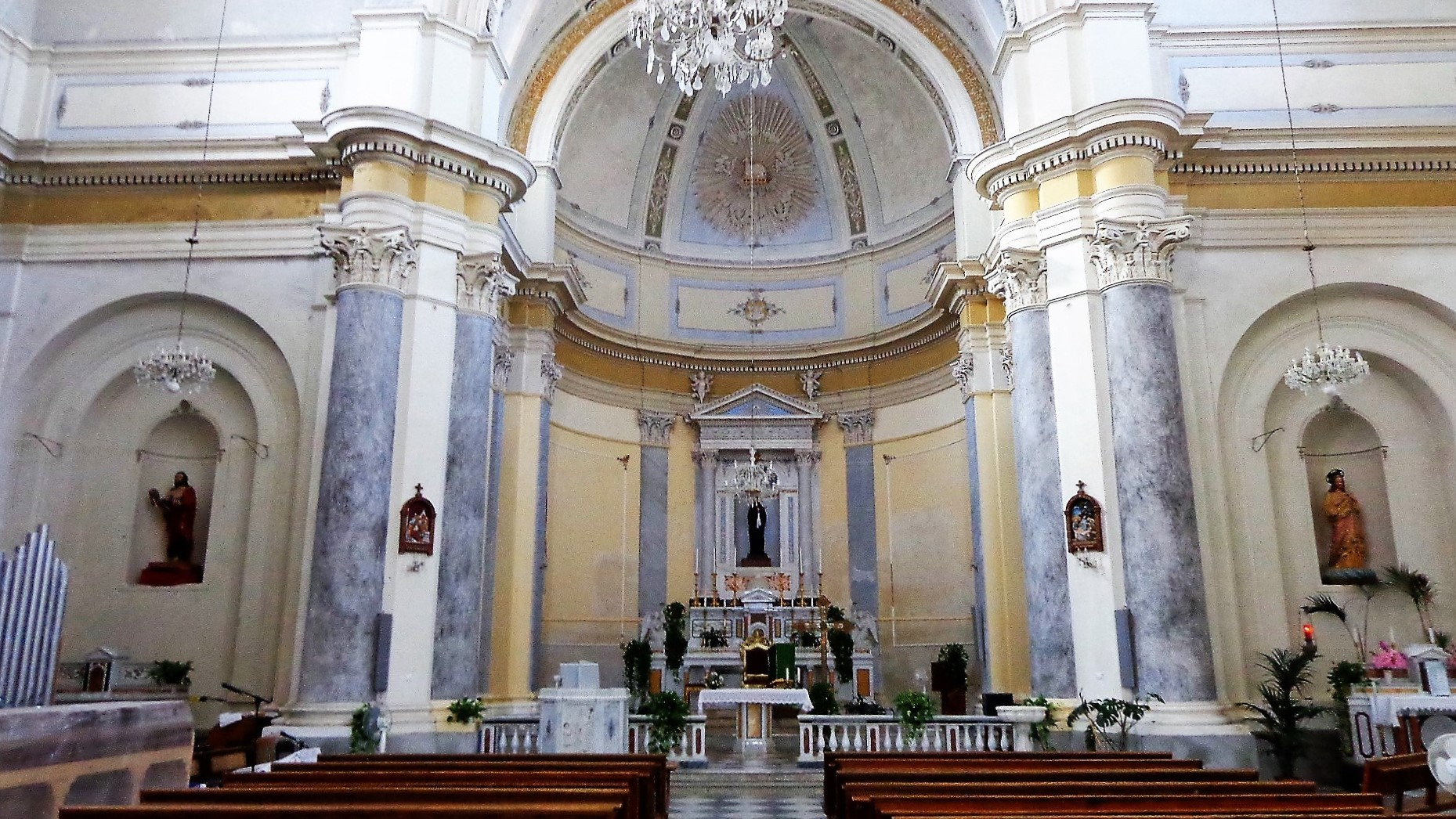 Presbiterio